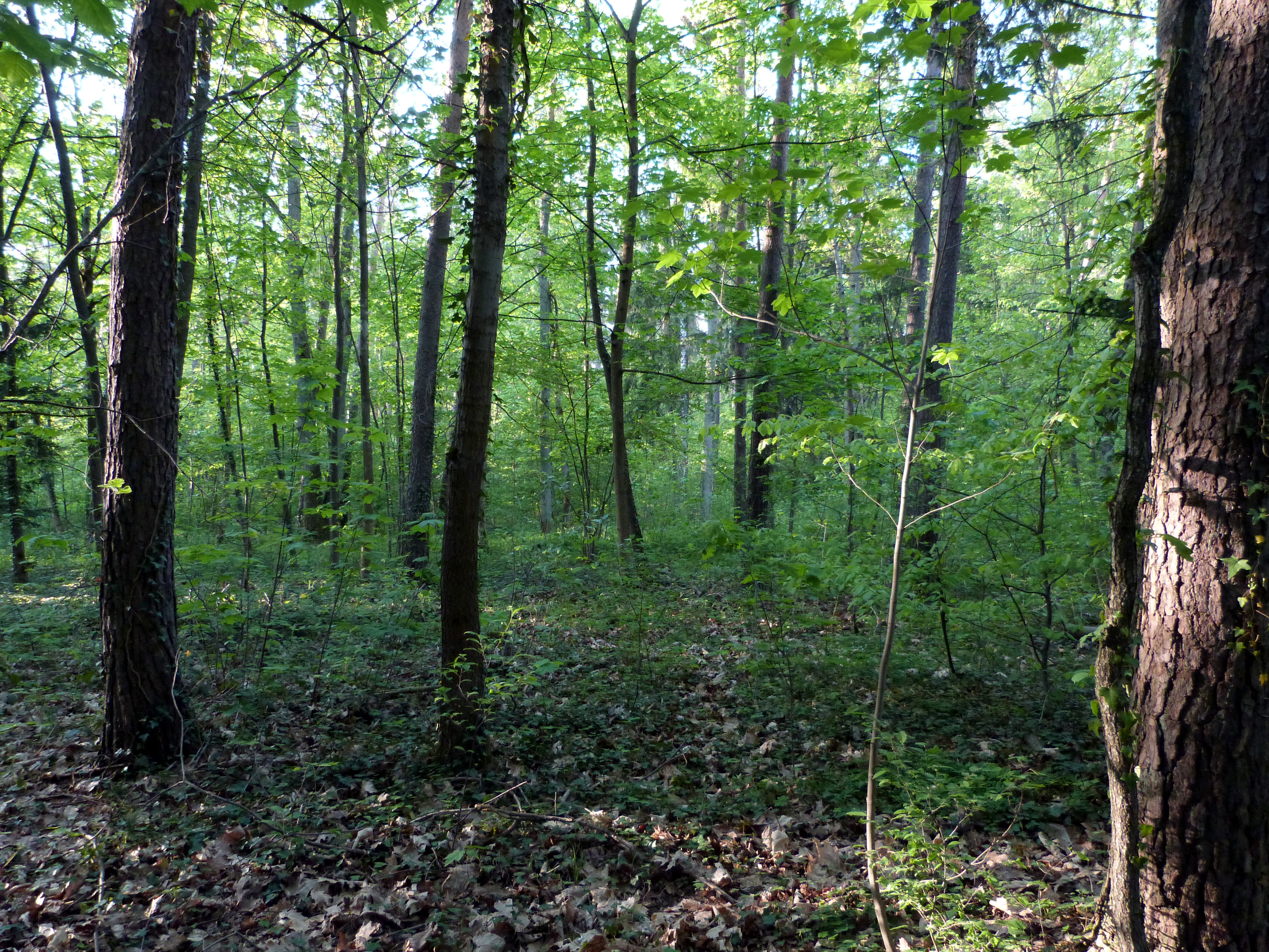 (LSG:BY-LSG-00340.08)_Meilwald mit Eisgrube Landschaftsschutzgebiet "Meilwald mit Eisgrube", nahe der Spardorfer Straße, unweit der Sportplätze des Turnerbund 1888 Erlangen